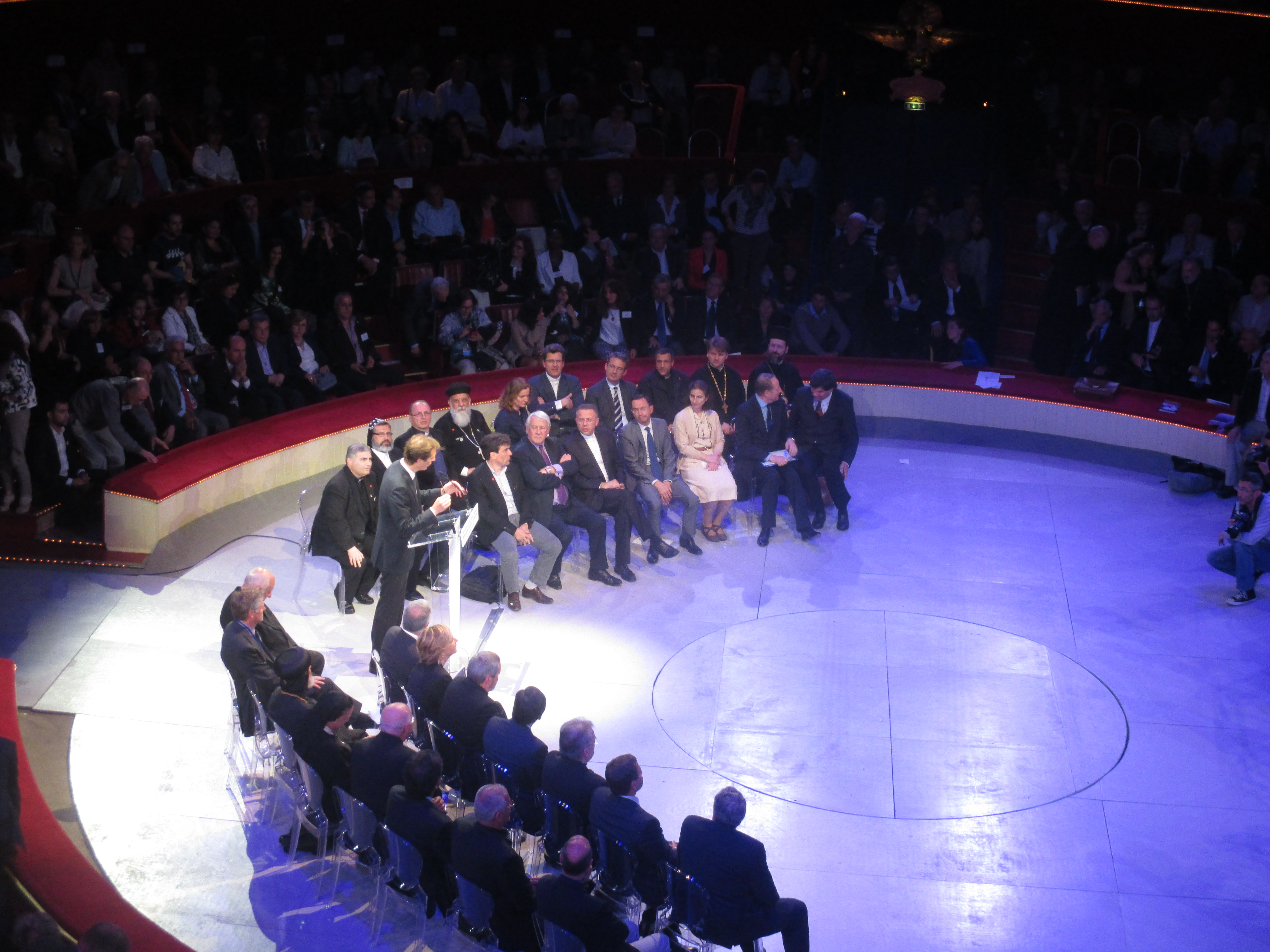 Soirée de soutien aux chrétiens d'Orient organisée par François Fillon et Valérie Pécresse. Cirque d'hiver de Paris, le 23 juin 2015. Orateur: Jérôme Chartier.